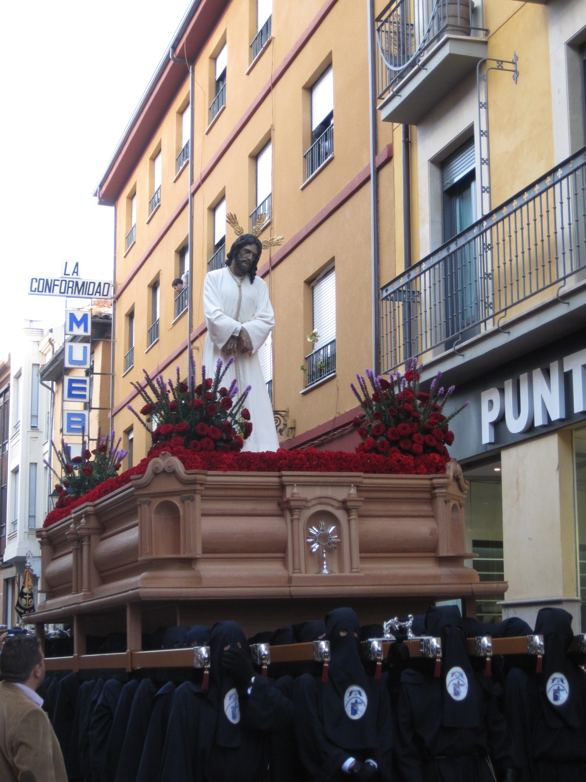 Paso de Nuestro Padre Jesús de la Esperanza Cautivo ante Anás. Sacramental y Penitencial Cofradía de Nuestro Padre Jesús Sacramentado y María Santísima de La Piedad, Amparo de los Leoneses. León, España.